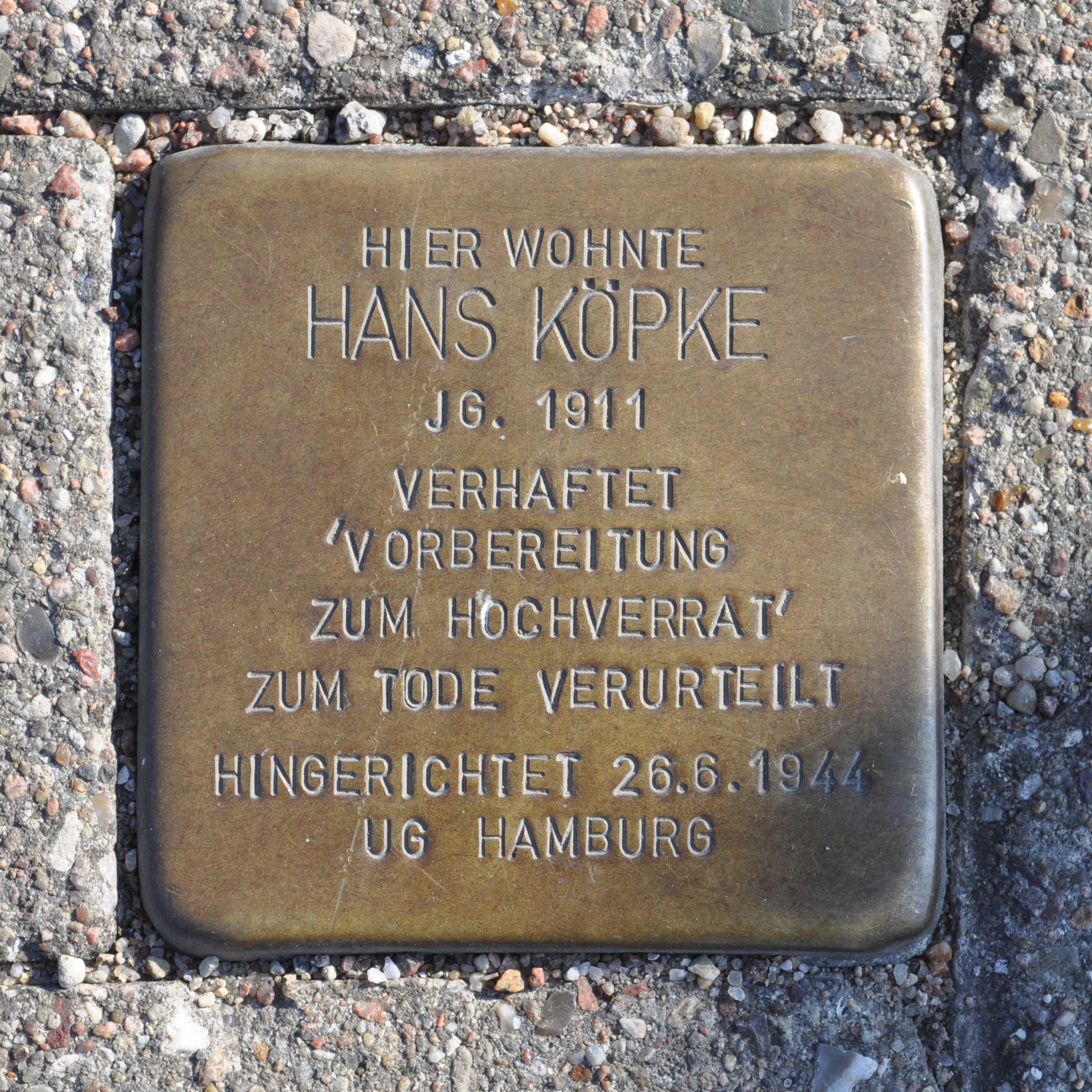 Stolperstein für Hans Köpke vor dem Haus Nagelsweg 63 in Hamburg-Hammerbrook.